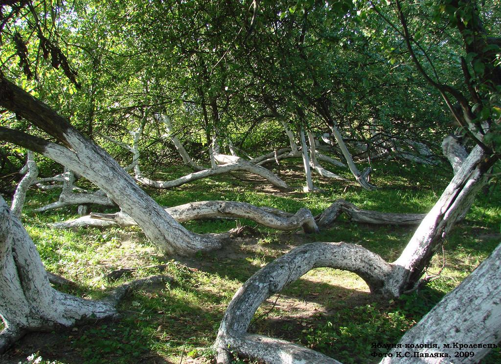 Яблуня-колонія у Кролевці